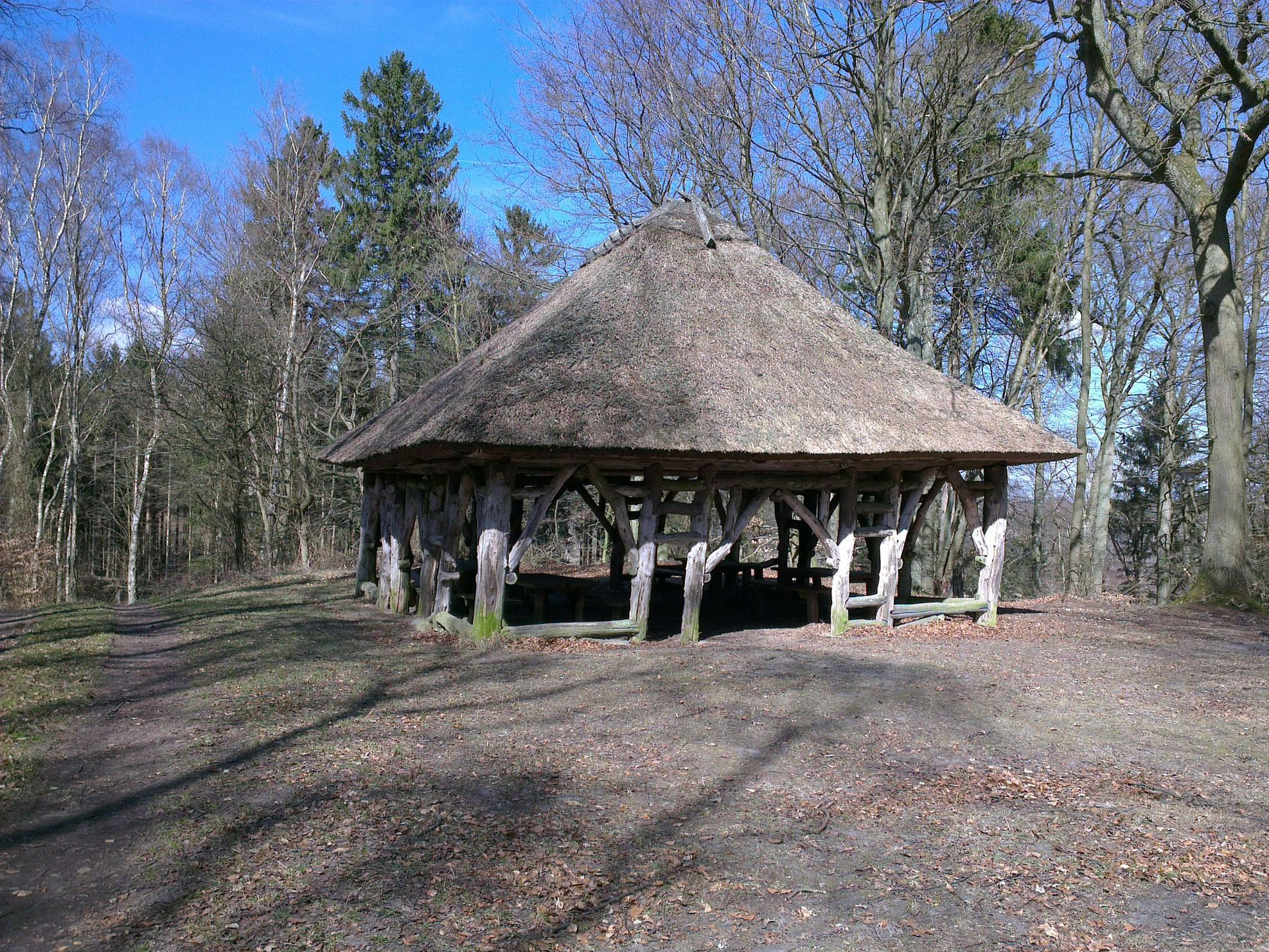 Frederik VII’s jagtpavillon fra 1857 befinder sig på skovvejen Jagthus i Jægerspris Nordskov. Jagtpavillonen er placeret på Frederikshøj, som er skovens højeste punkt med 20 meter over havet.